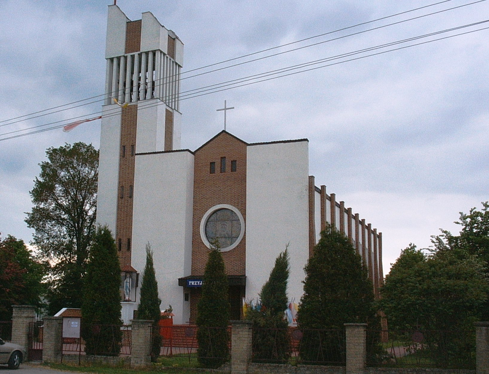 Kościół w Bożem